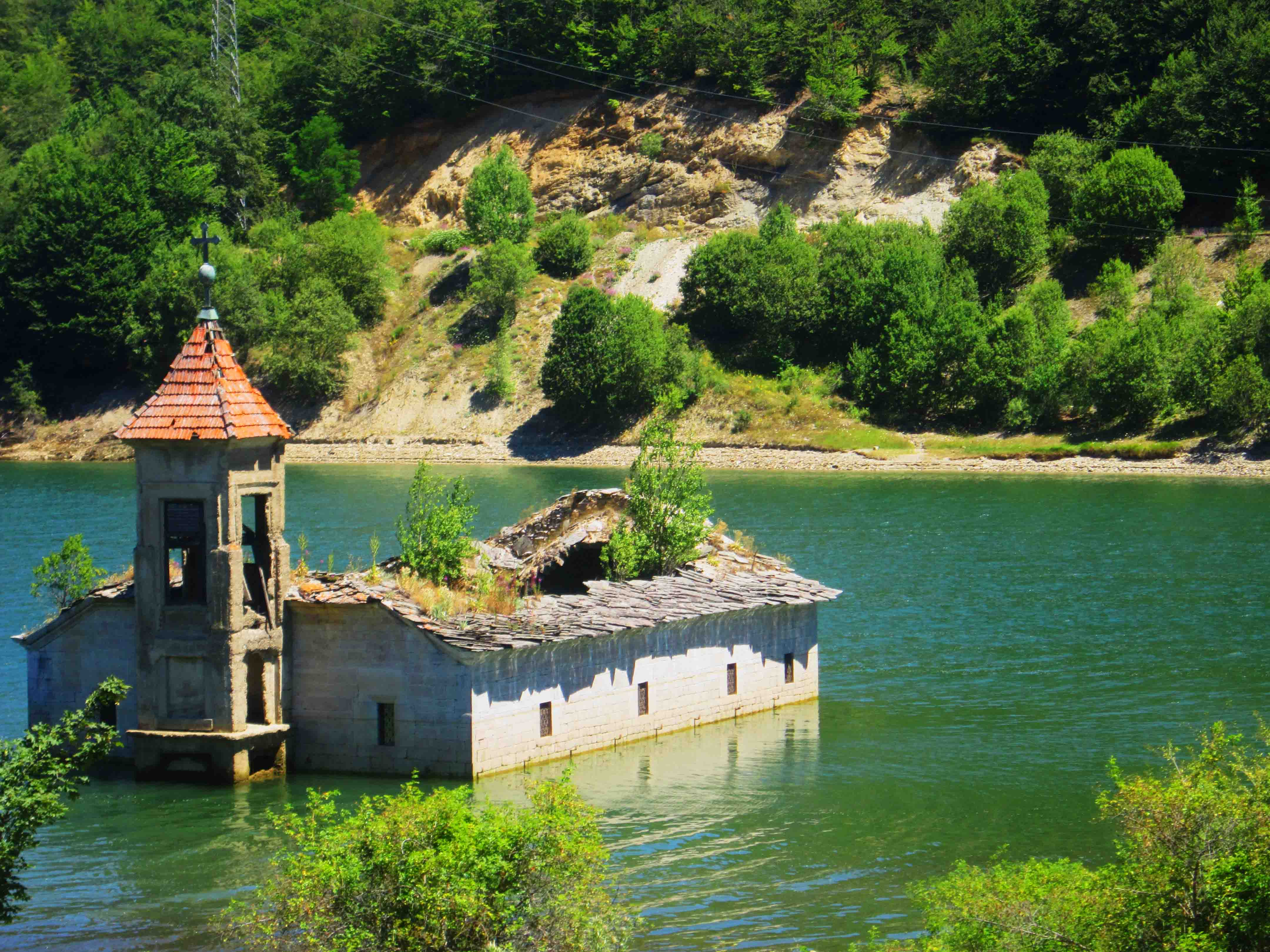 Старата црква „Св. Никола“, која во средината на минатиот век била потопена при создавањето на Мавровско Езеро.